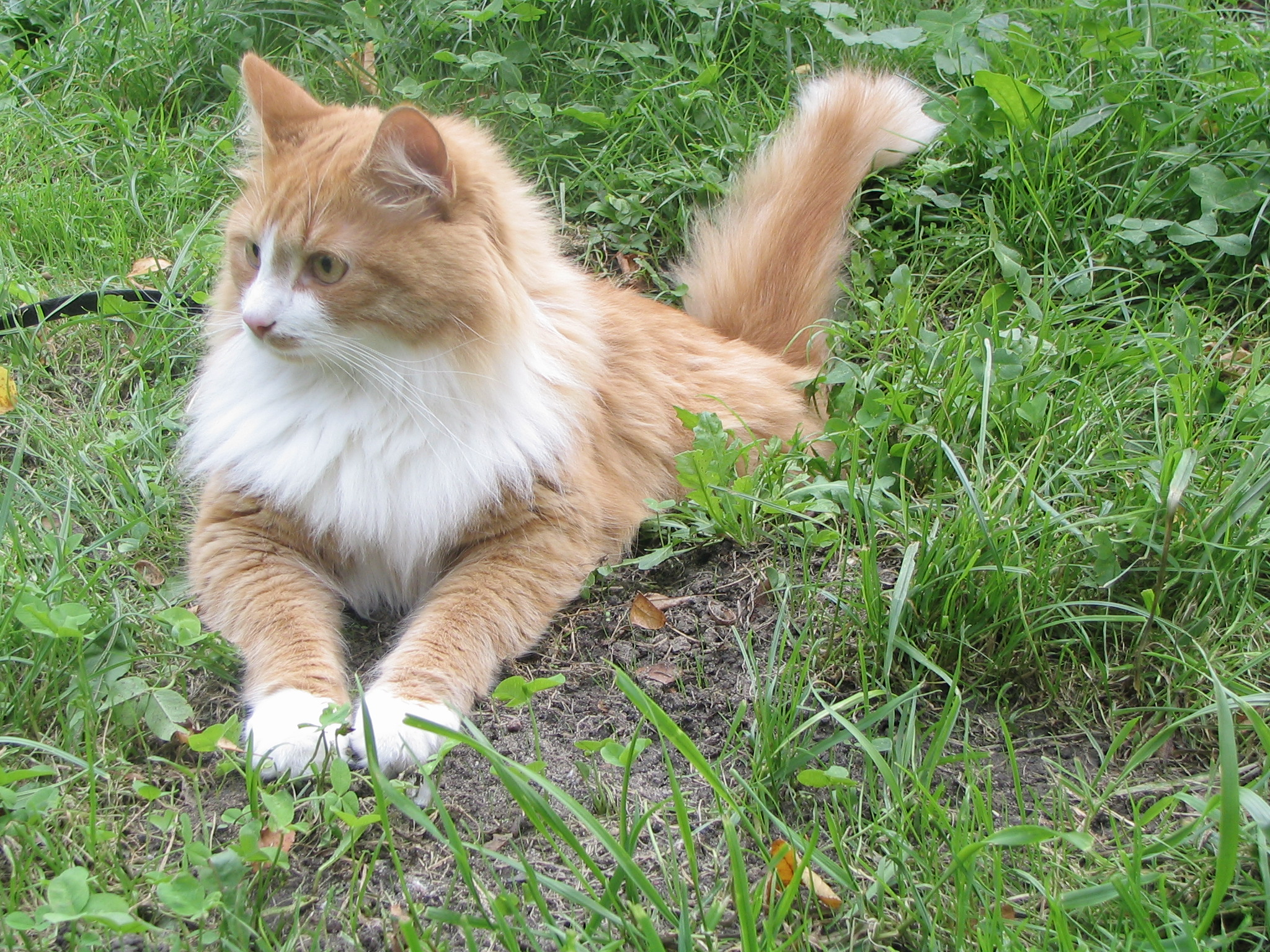 Siberian cat Tofik. Rudy kocur rasy syberyjskiej o imieniu Tofik z Leśna Hodowla*PL.